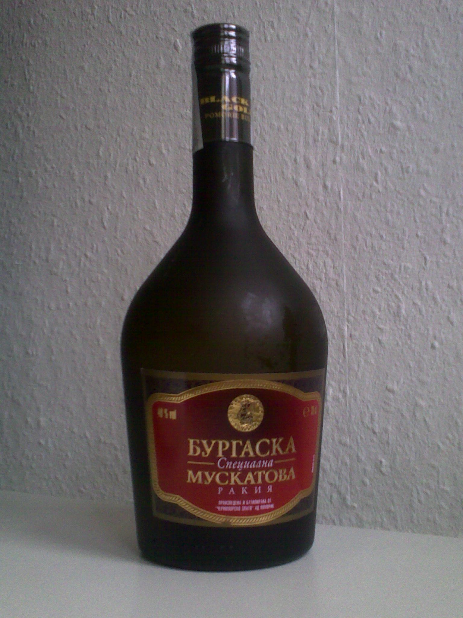 Rakija aus der Rebsorte Muscat aus Bulgarien: Burgaska Muskatova Rakija Spezialna